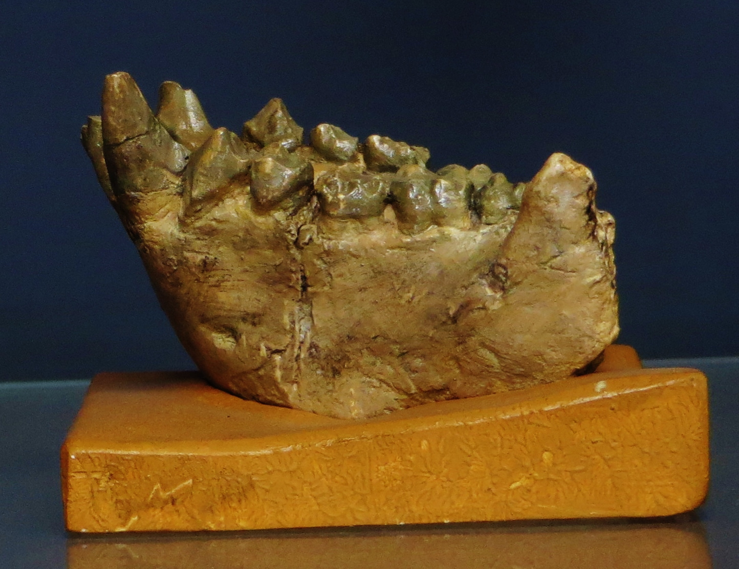 Fossil of Dryopithecus, an extinct mammal- Took the photo at Musee d'Histoire Naturelle, Paris